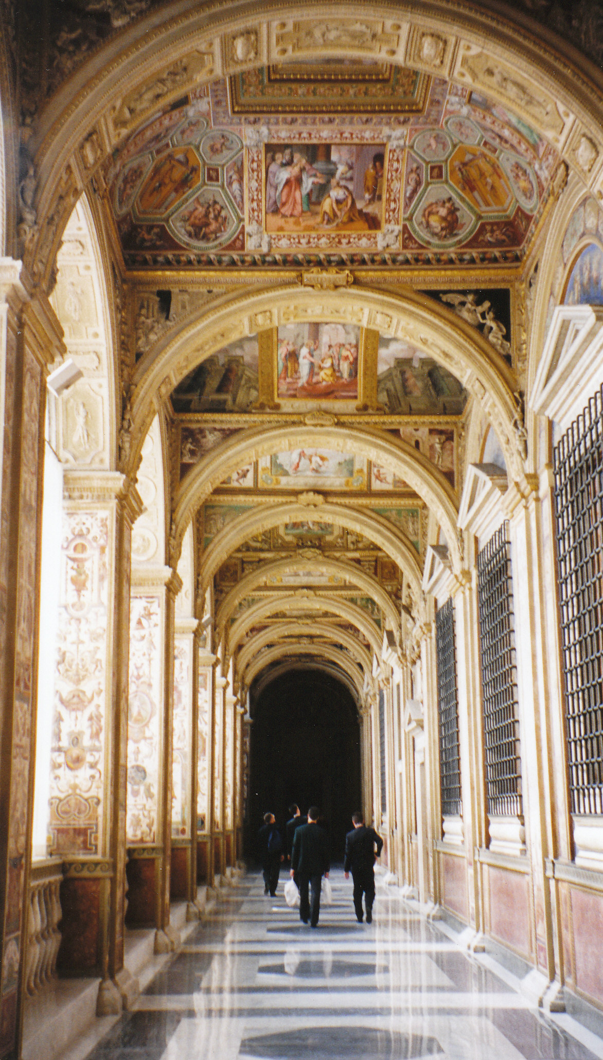 La loge du 2ème étage du palais apostolique du Vatican (aile Nord), vue depuis l'entrée de la salle Clémentine vers l'entrée de la chapelle Redemptoris Mater et le palier des ascenseurs